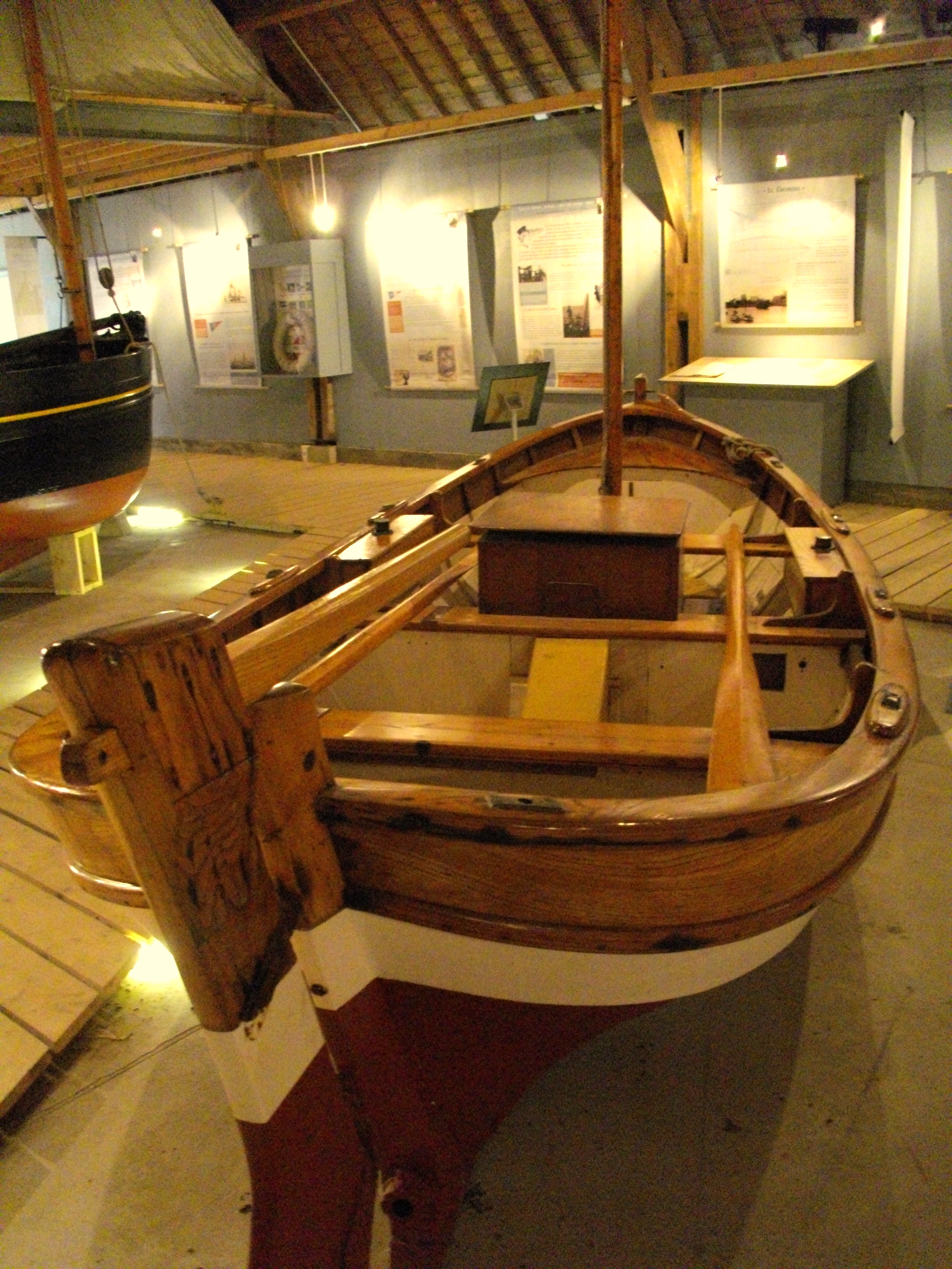 Le Piquoteux : modèle de bateau de pêche (Basse-Normandie)